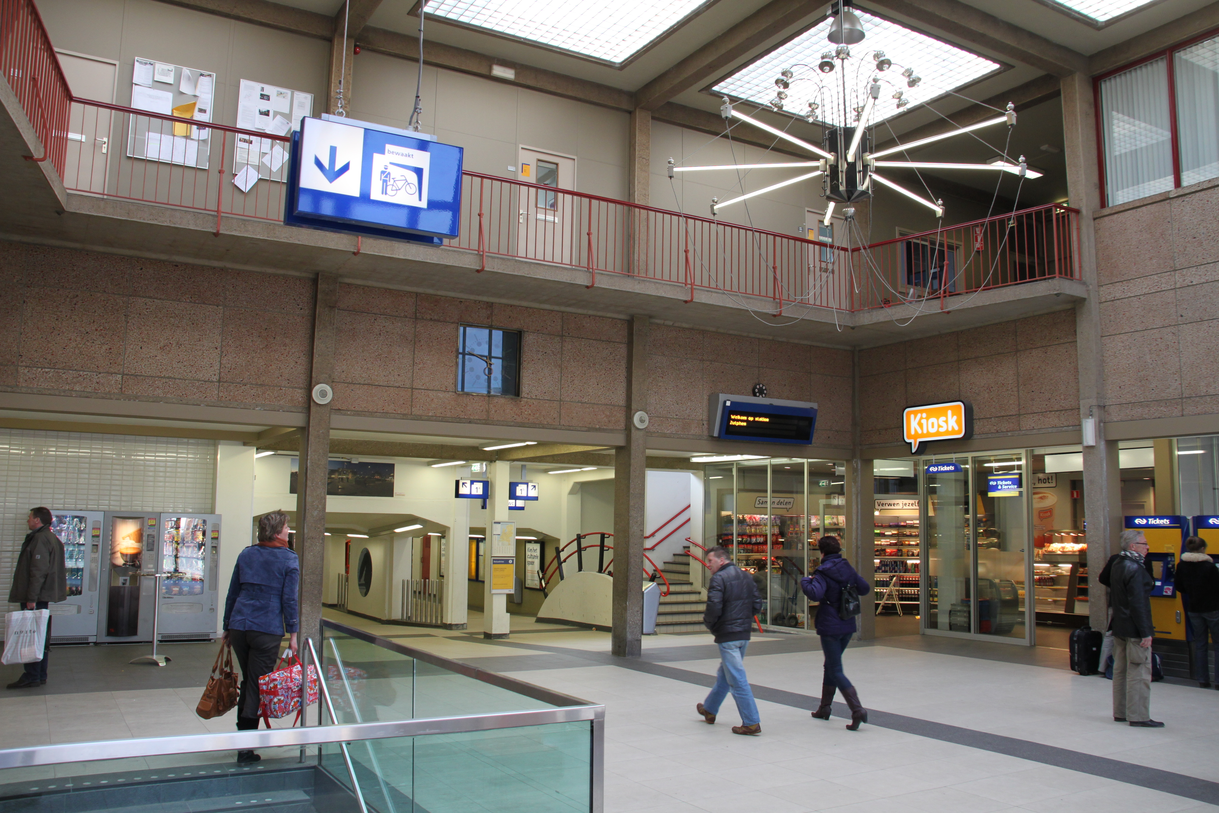 Stationshal van station Zutphen in 2010